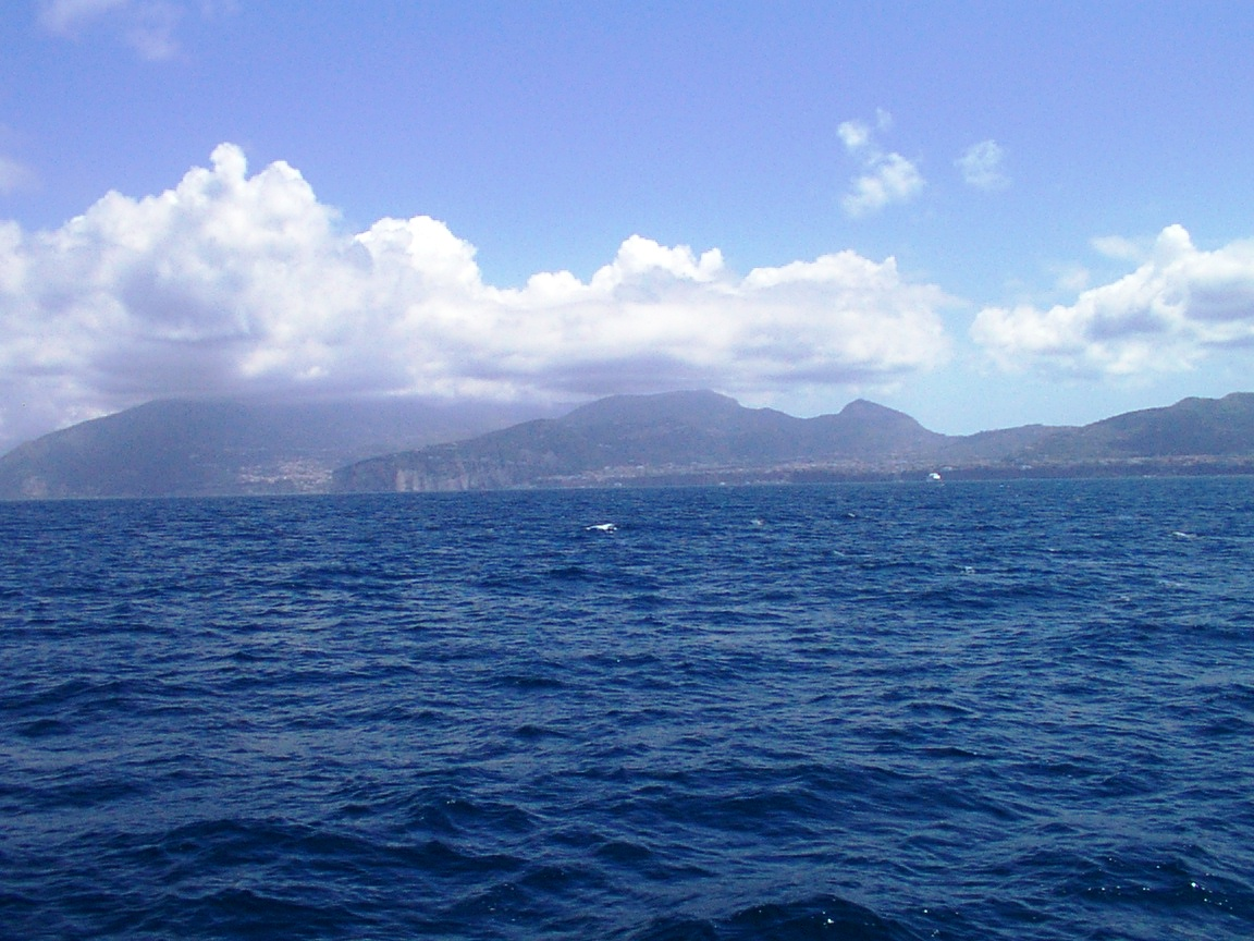 Costiera Amalfitana